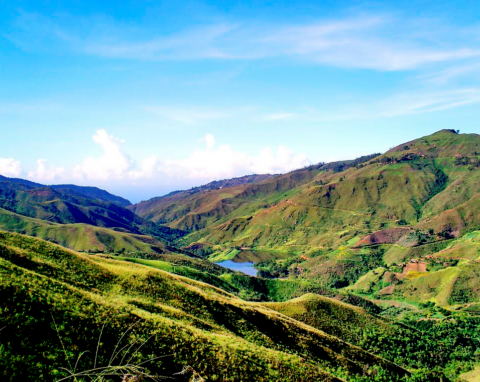 Lago Dique en Petaquire, Estado Vargas, Venezuela